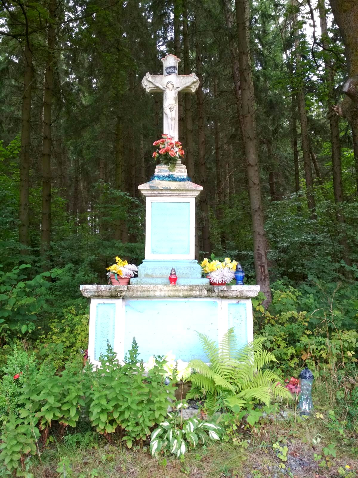 Przedwojów, krzyż przy drodze do Krzeszowa (Betlejem)